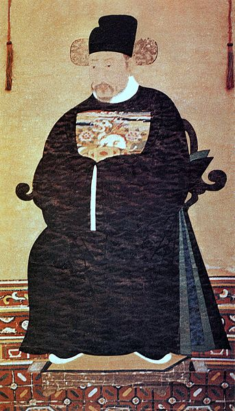 작자 미상 김완 초상. 대한민국의 보물 제1305호(작자미상 김완초상 년도미상 7780.jpg-대한민국 문화재청)